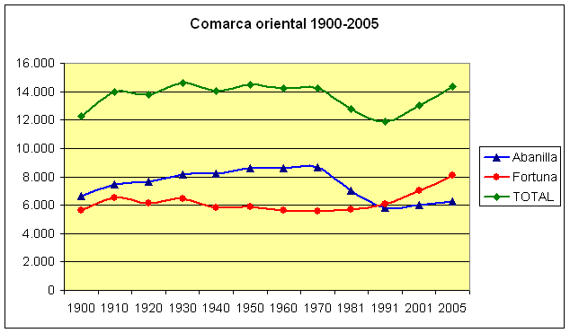 Población (1900-2005) en el contexto de la comarca The population of the municipalities of the "Comarca oriental" (or "Región oriental") region, Murcia, Spain, 91900-20050. Fortuna and Abanilla. Own work, given to PD. Source: Instituto Nacional de Estadística